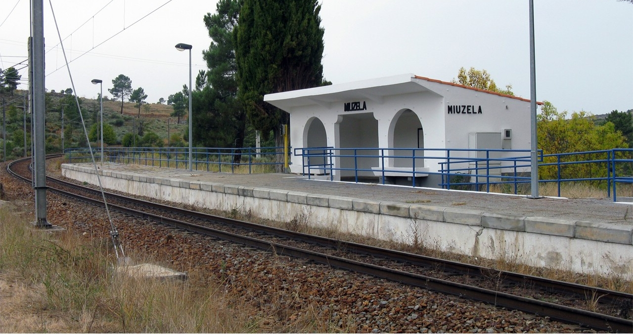 Apeadeiro da Miuzela do Côa, na Linha da Beira Alta, entre as estações da Cerdeira e Noémi.